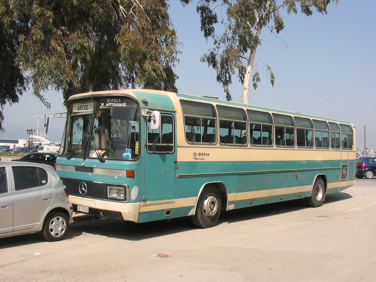 Mercedes-Benz O 302 mit Biamax-Aufbau